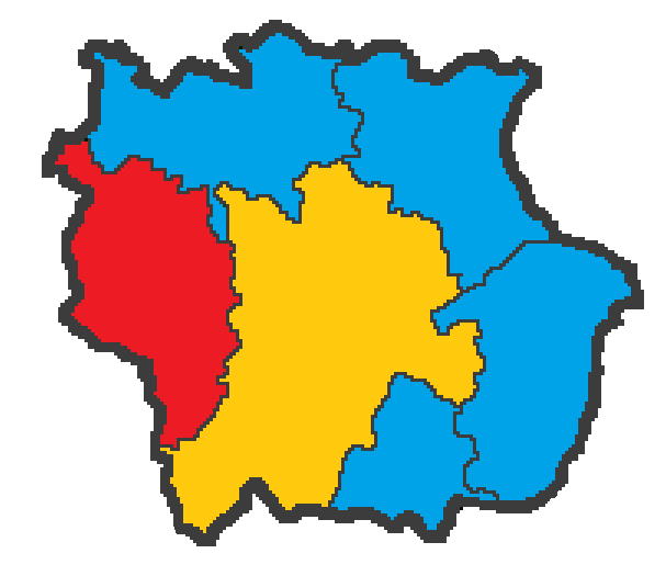 Alcaldes comarca del Deza.